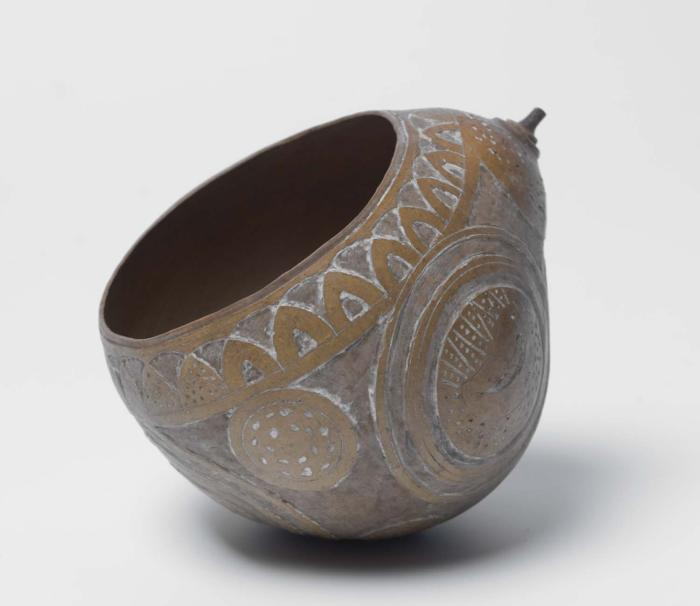 Nap. Deze kalebasschaal is vermoedelijk een offergave die de slaven op de plantage Clifford Kocqshoven, bij een grote kankantri-boom (Ceiba pentandra)hebben neergelegd. De schaal is met snijwerk van concentrisch cirkels en een vogel versierd. De kankantri was een heilige boom voor de slaven en de marrons. Aan de geesten van die bomen werden offers gegeven. De plantage-eigenaar Van Breugel verhaalt in zijn 'Dagverhaal eener reis naar Suriname' dat ook de slaven van zijn plantages schaamschorten en kalebassen met voedsel als offergaven onder die boom legden. Van Breugel heeft zulke offergaven meegenomen naar Nederland. Op zijn collectielijst vinden we de twee objecten terug, die overeenkomen met de beschrijvingen van de offergaven in zijn 'Dagverhaal'. Daarom vermoedt Legêne dat juist in deze kalebasschaal voedsel is geofferd aan de geesten van de kankantri-boom. Het object is een van twee kalebassen (H-2552 & H-2553) die met de kleine Suriname-collectie van Van Breugel opgenomen in het Koloniaal Museum. Hier werd het gescheiden van de documentatie en werd het een object, waar men niet meer van wist, waar het voor diende. Beide kalebassen werden toegeschreven aan de Marrons. Legêne wijst erop dat na de emancipatie van de slaven in 1871 in de volkenkundige collecties '… iedere relatie met slavernij verdween van objecten uit de slavernijcultuur zelf' (1998, p.386-387). Voor Legêne en Price zijn die kalebassen en de twee obia's van de plantage (H-2965 & H-2966, beide collectie in het Tropenmuseum) tevens een indicatie, dat de culturen van de plantageslaven en de marrons aan het begin van de 19de eeuw dicht bij elkaar lagen. (Bronnen: Susan Legêne, De bagage van Blomhoff en Van Breugel, Amsterdam 1998, p.264-265 en Susan Legêne, "From broom to obeah and back" in: Patricia Spyer, 'Border fetishisms. Material objects in unstable spaces', New York & London 1993, 35-59, aldaar 43-46. Tekst: LM, 14 april 2009). . Besneden nap van kalebasschaal Undetermined language : Kerbassie